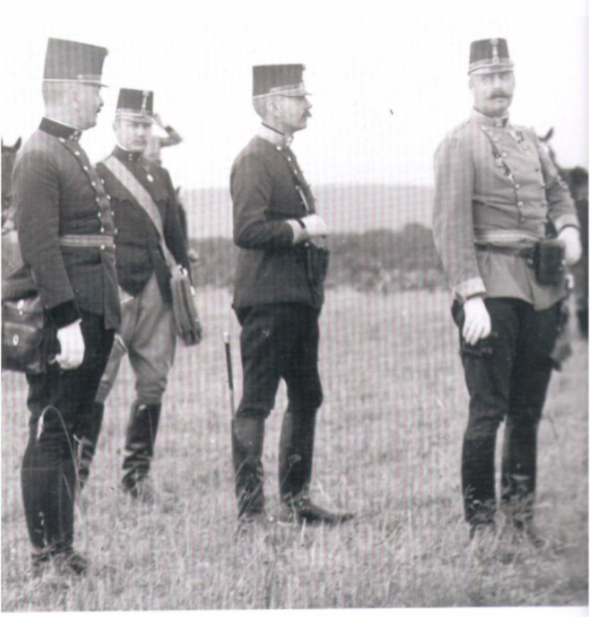 Erzherzog Leopold Salvator von Österreich (1863–1931) mit k.u.k. Offizieren und mit seinem k.u.k. Adjutanten (2. von links)